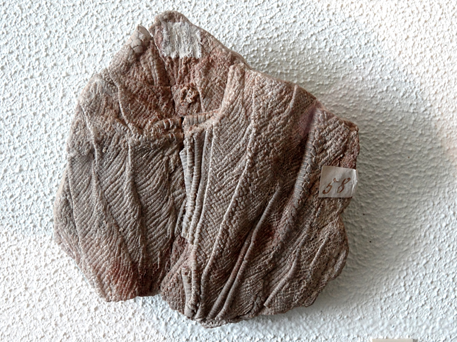 Seelilie Isocrinus basaltiformis, fein verzweigte Fangarme aus dem Schwarzen Jura der Fränkischen Alb; Fundort nahe Bad Staffelstein /Oberfranken; Exponat in der Petrefaktensammlung Kloster Banz